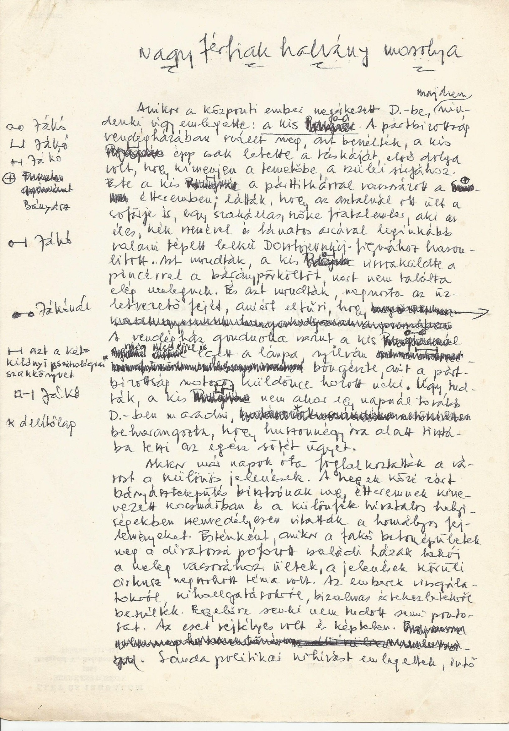 Nagy férfiak halvány mosolya - Pintér Tamás kézirata